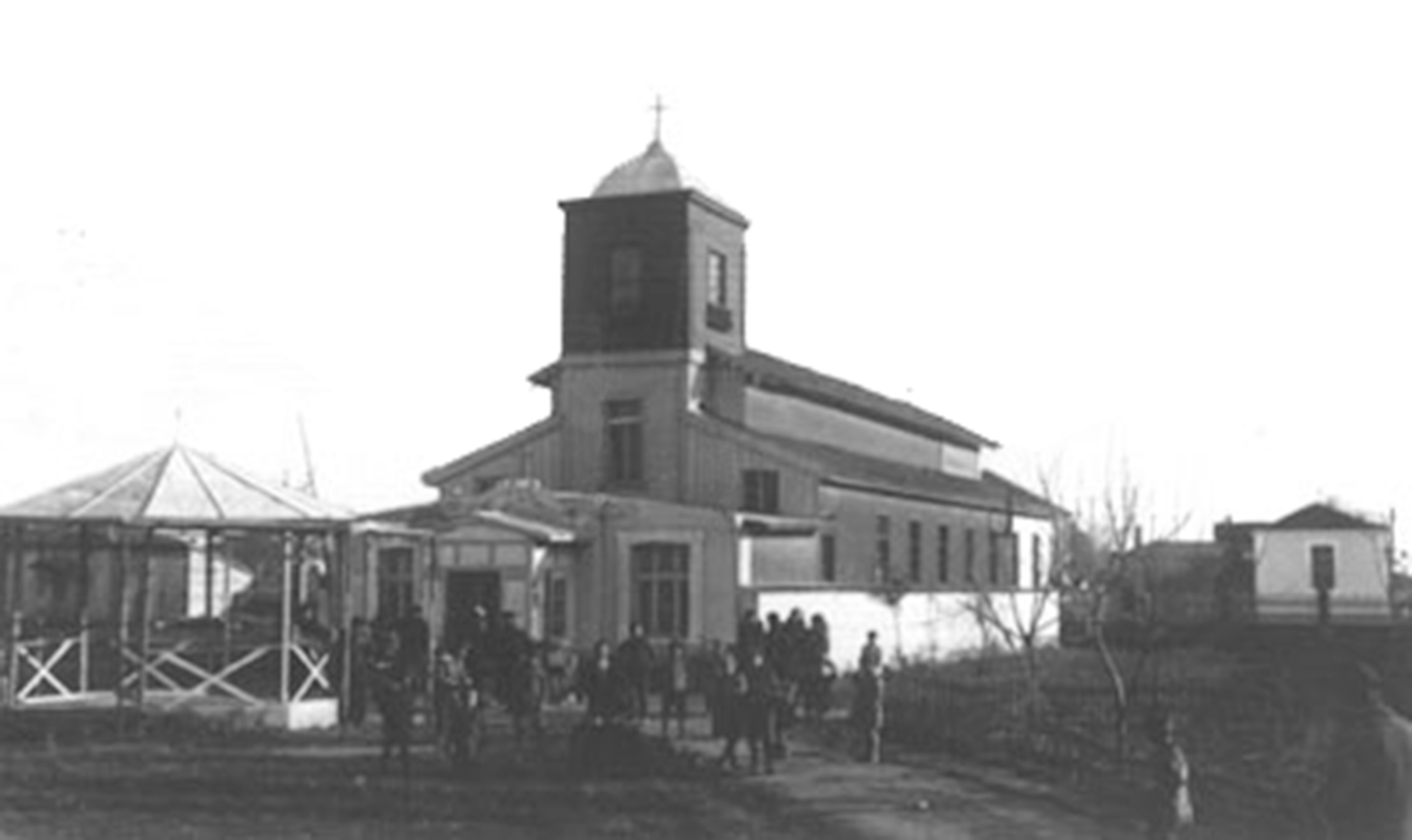 Българската черква Св. Св. Кирил и Методий в Дедеагач